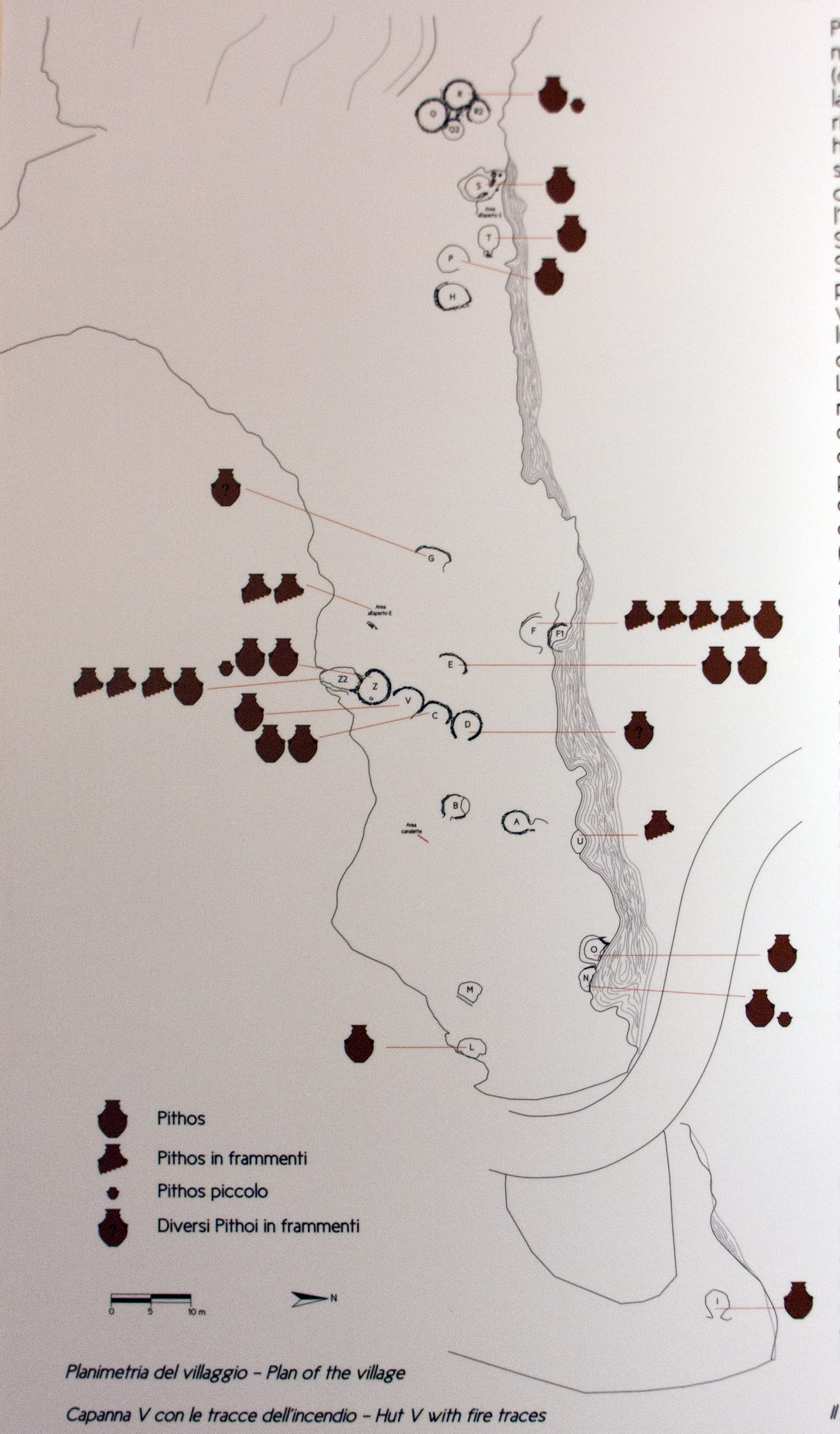 Planimetria del villaggio di Portella, Salina